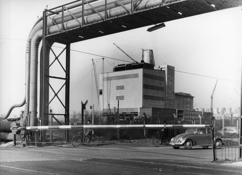 Zeche Westerholt, Westerholt Hibernia AG Herne, jährlich 1,121 Millionen to. Fett- und Gaskohle Vorrat 4500 Millionen to.